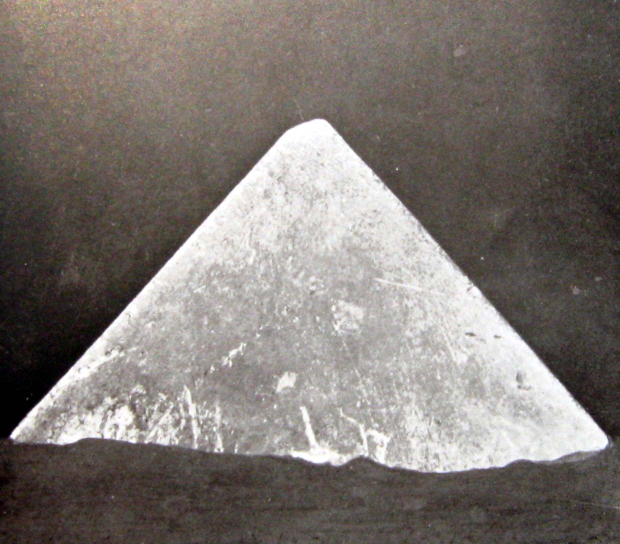 Modèle en calcaire de la pyramide de Hawara trouvée par petrie sur les lieux)